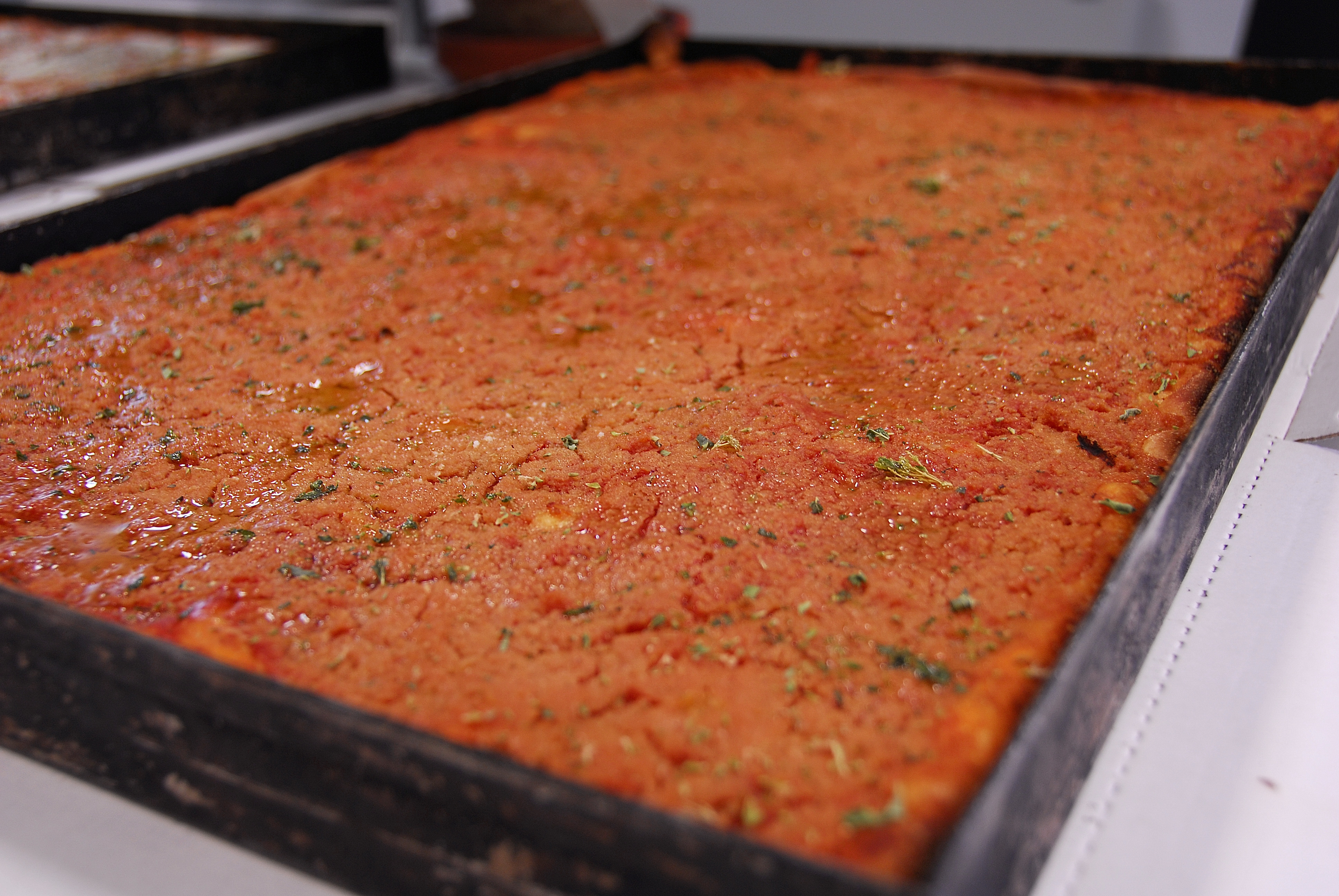 Sfincione palermitano - Italia.